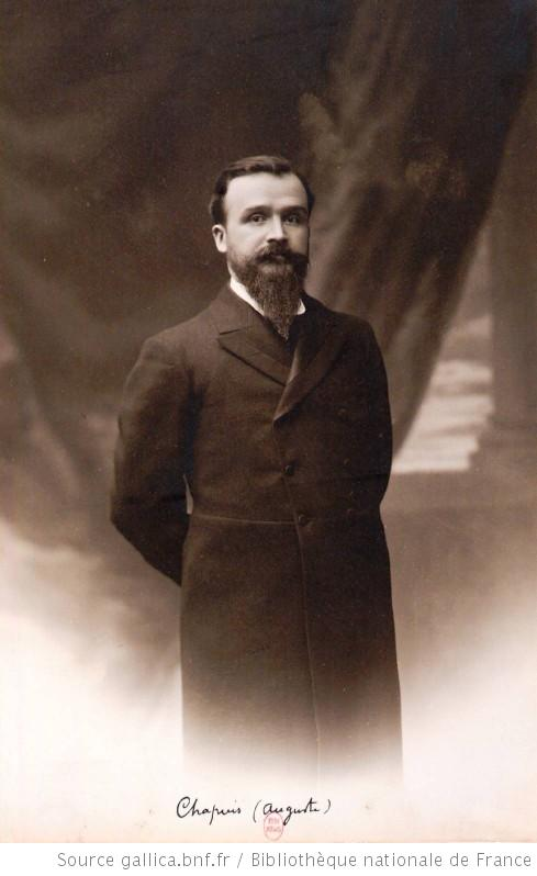 Portrait d'Auguste Chapuis, source Gallica